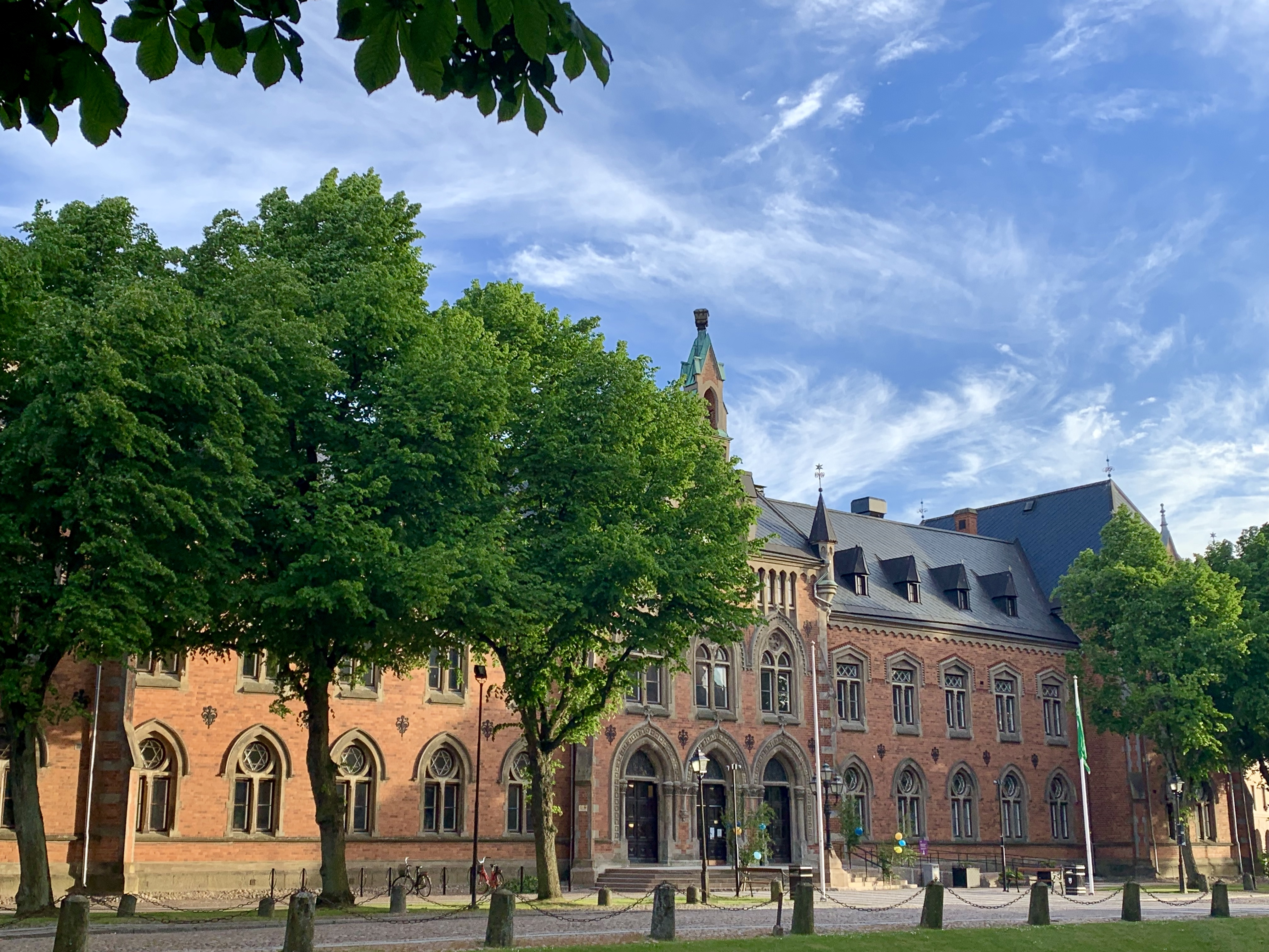 Skara stadshus i gamla läroverket